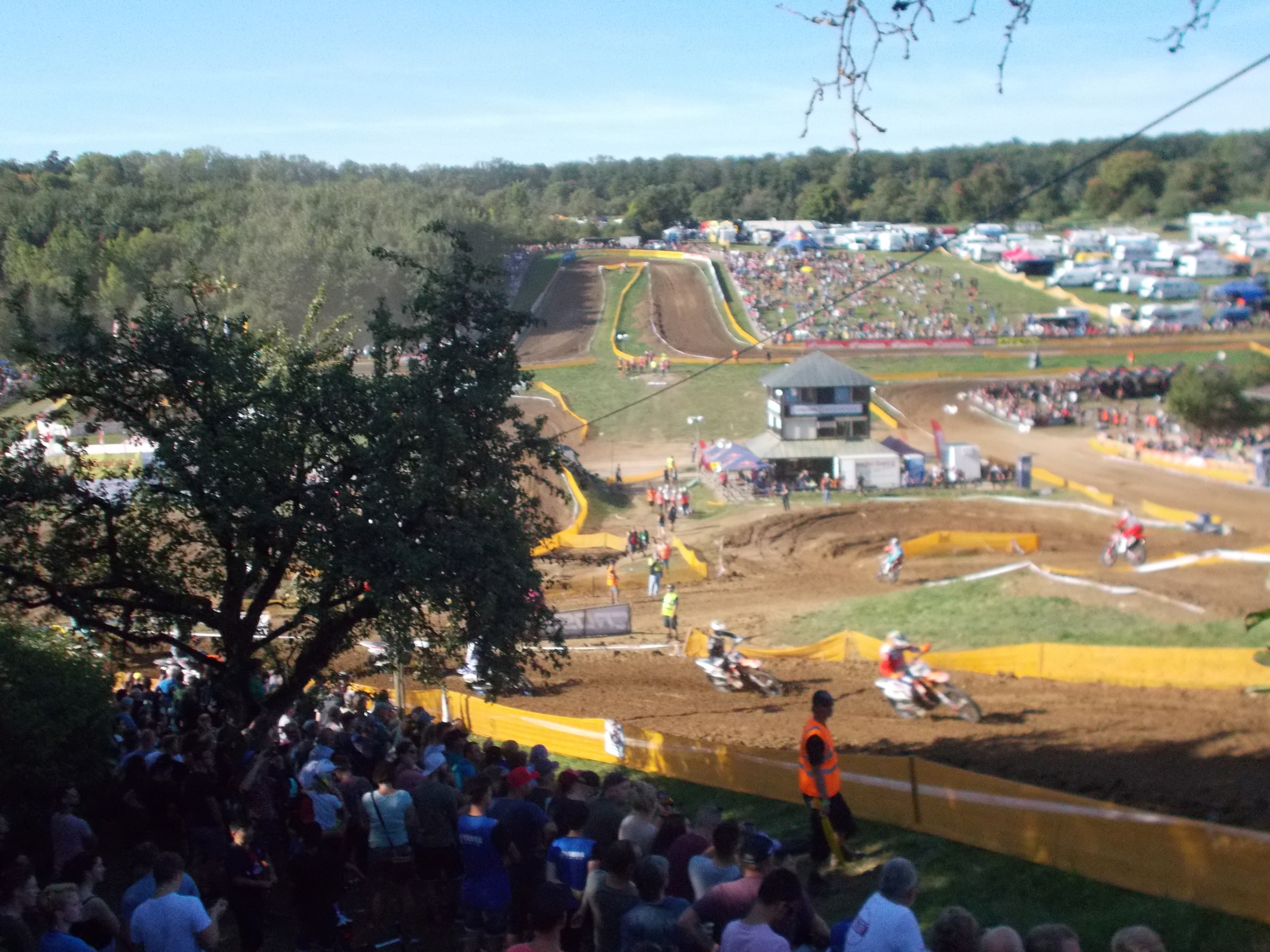 Schlusslauf der ADAC MX Masters 2019